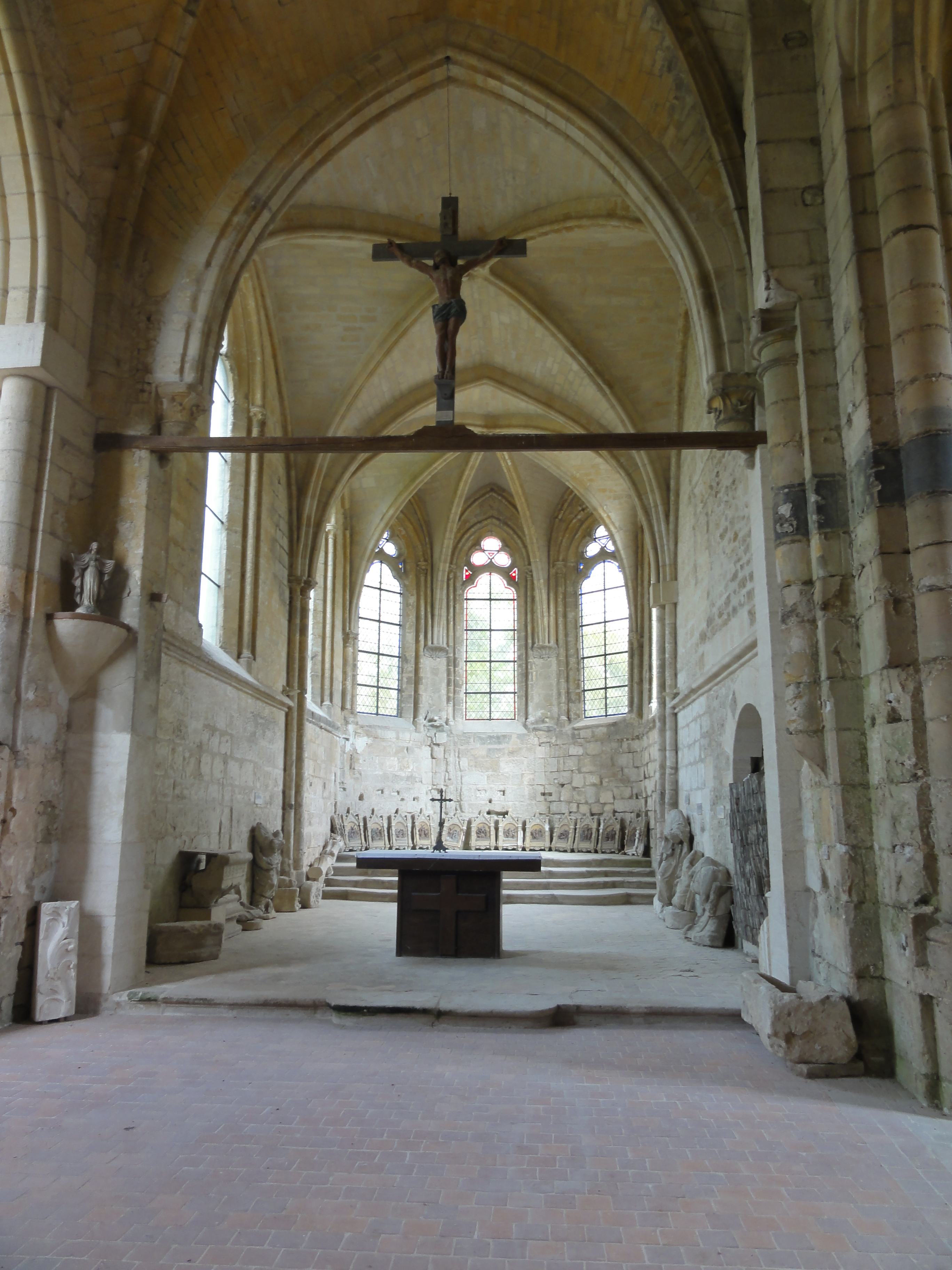 coeur de l'Église Saint-Martin de Marquemont